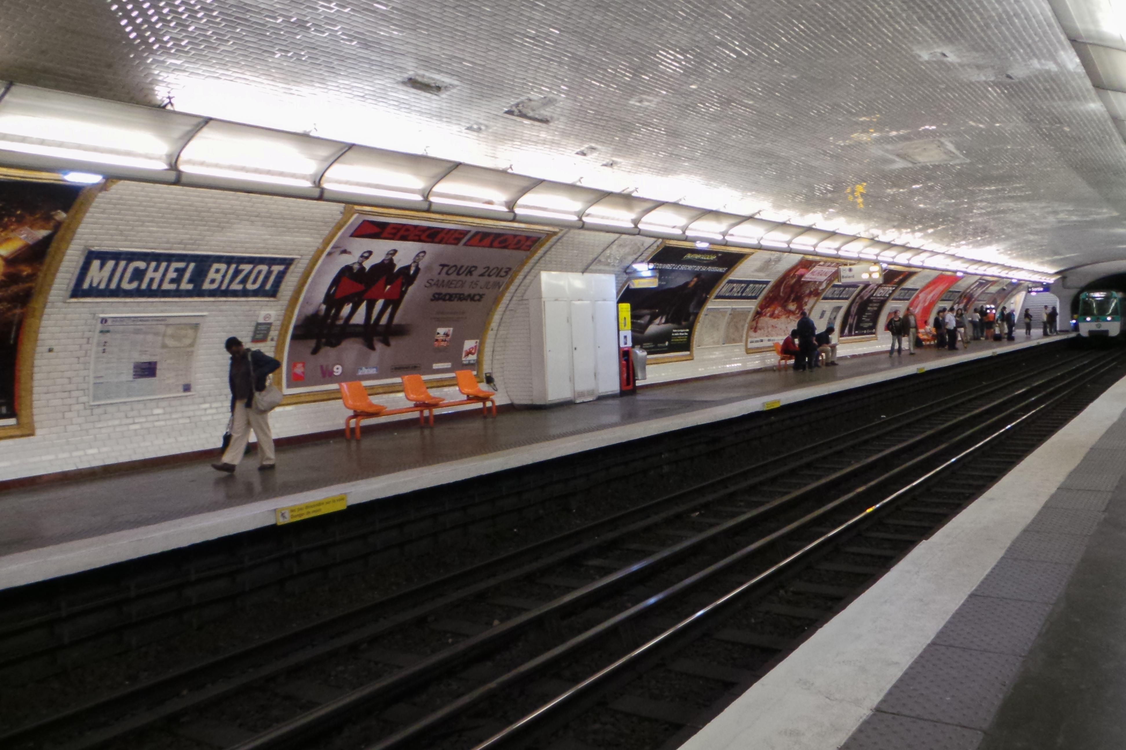 Station de métro Michel Bizot, ligne 8 du métro de Paris - Paris, France